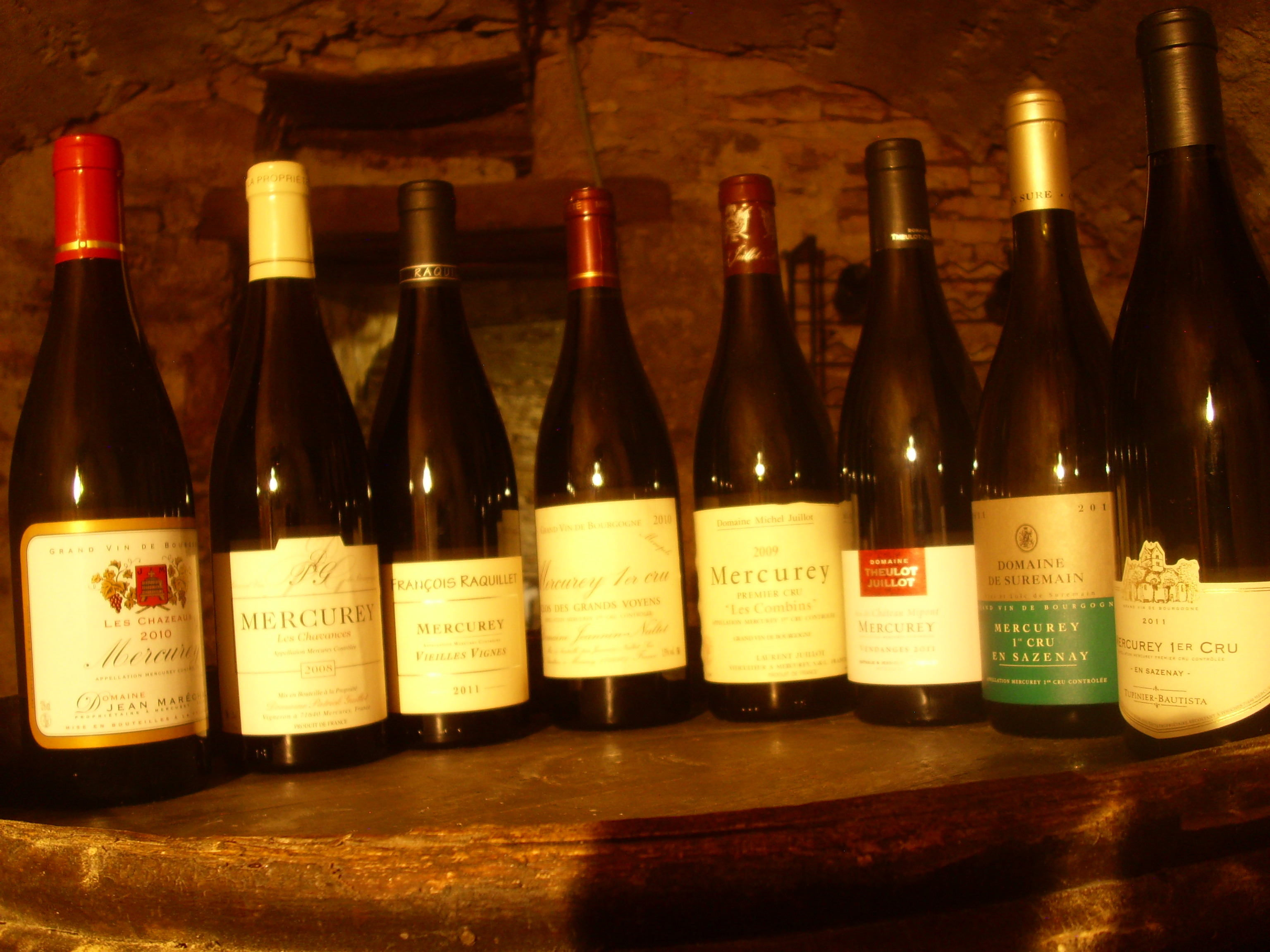 Bouteilles de Mercurey de divers producteurs de l'appellation